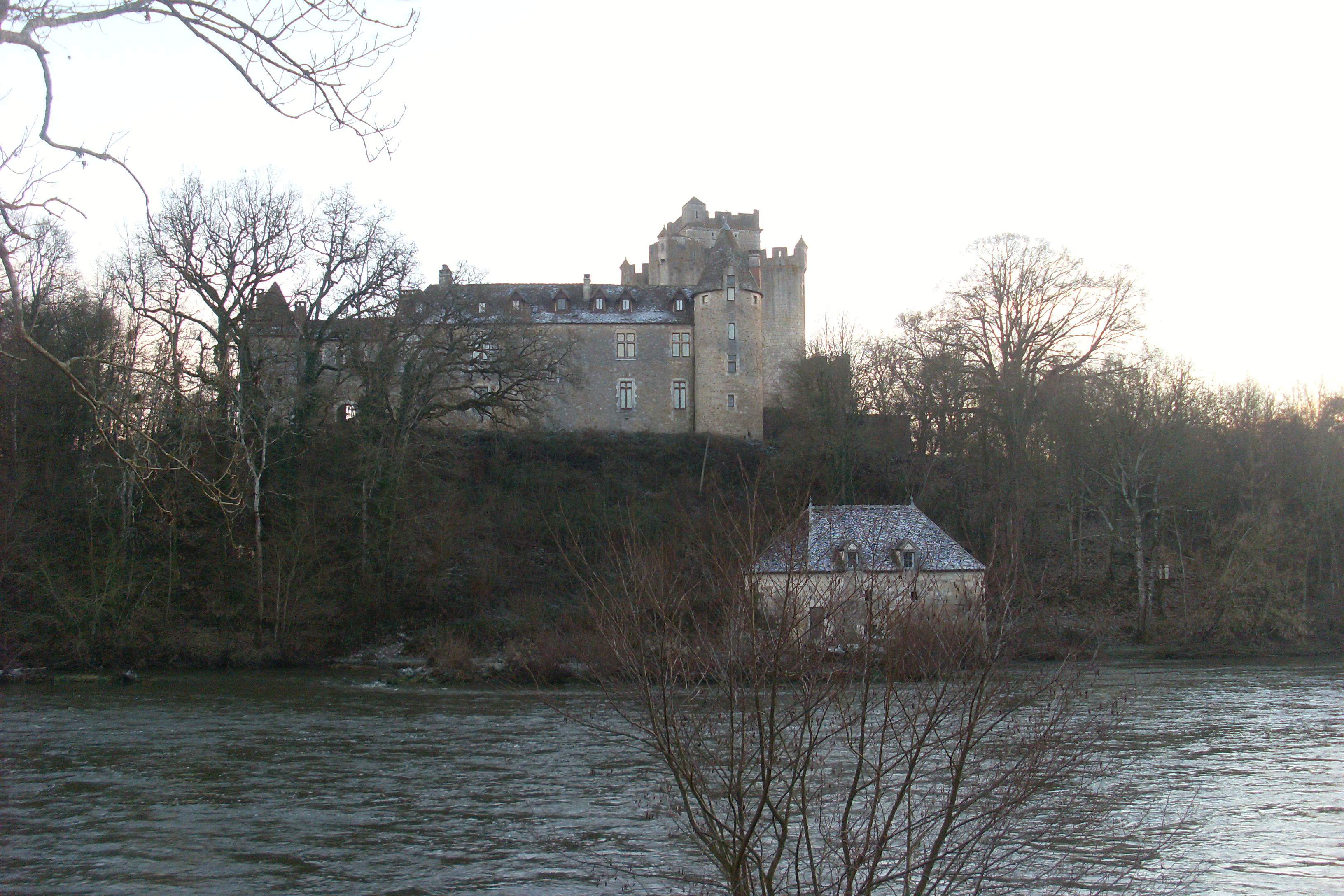 Château de Romefort à Ciron